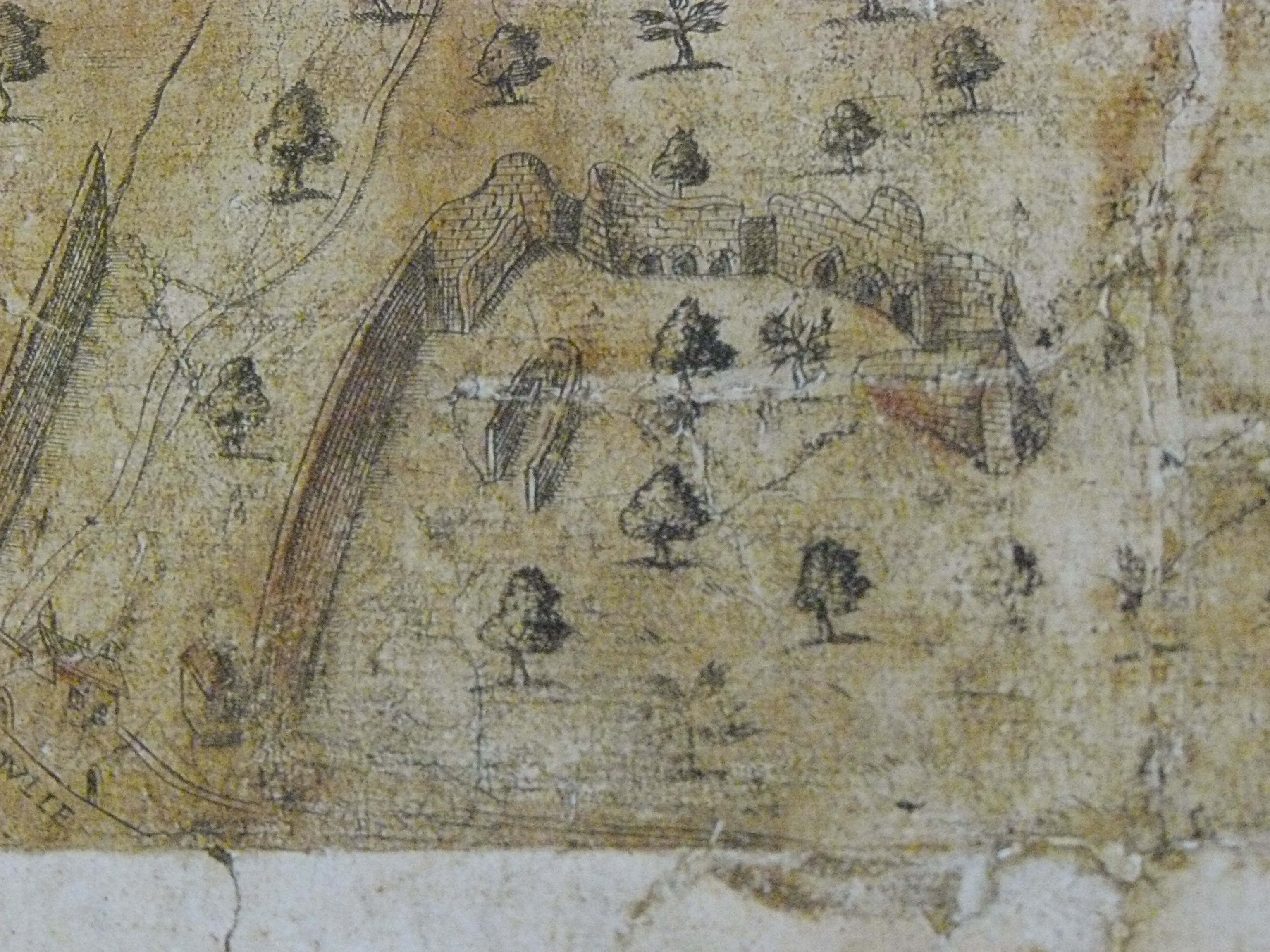 Détail des ruines de l'Odéon romain sur le plan scénographique de Lyon de 1550.